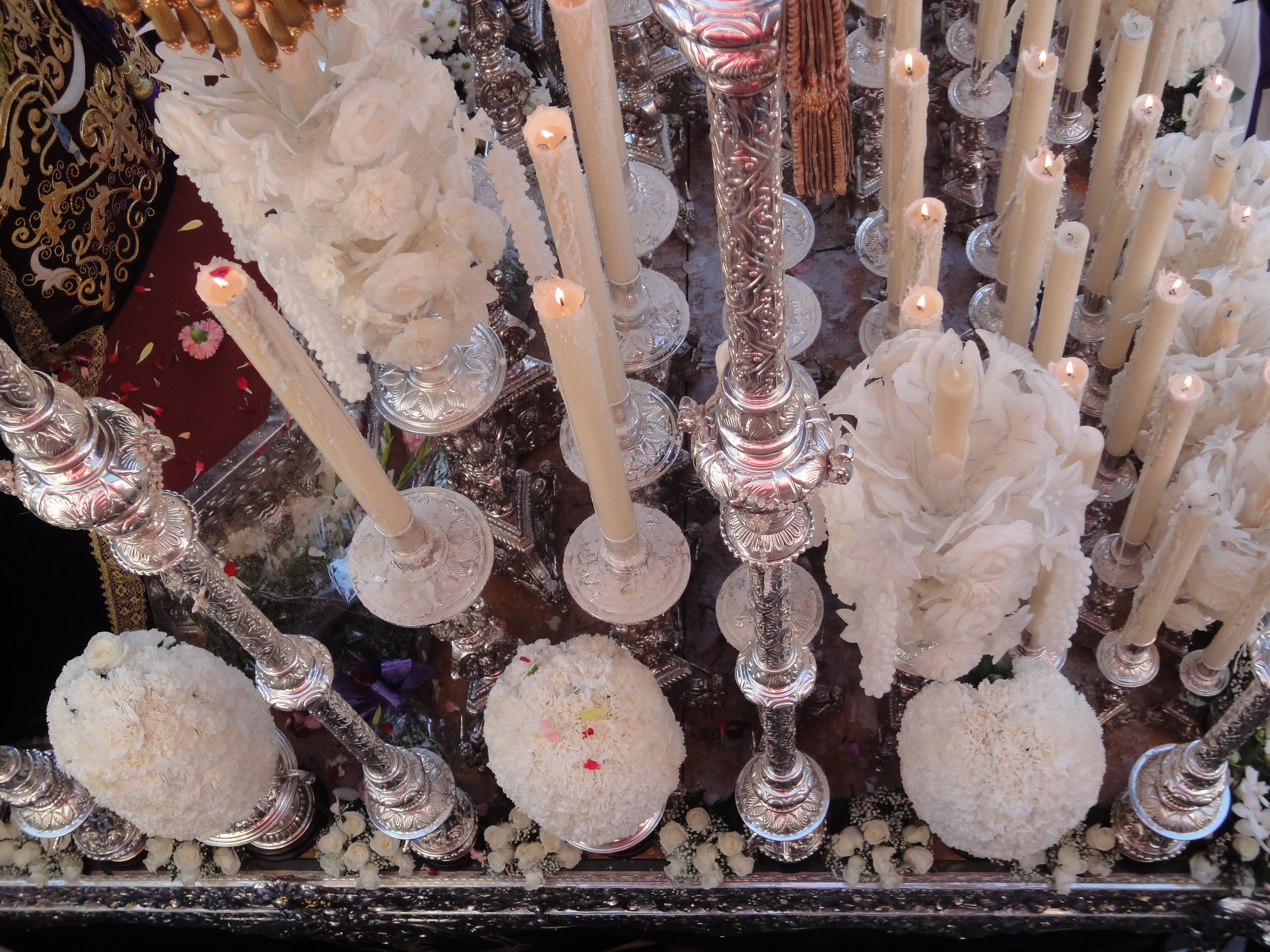 Detalle del paso de María Santísima del Mayor Dolor de Linares donde pueden apreciarse los varales y la candelería